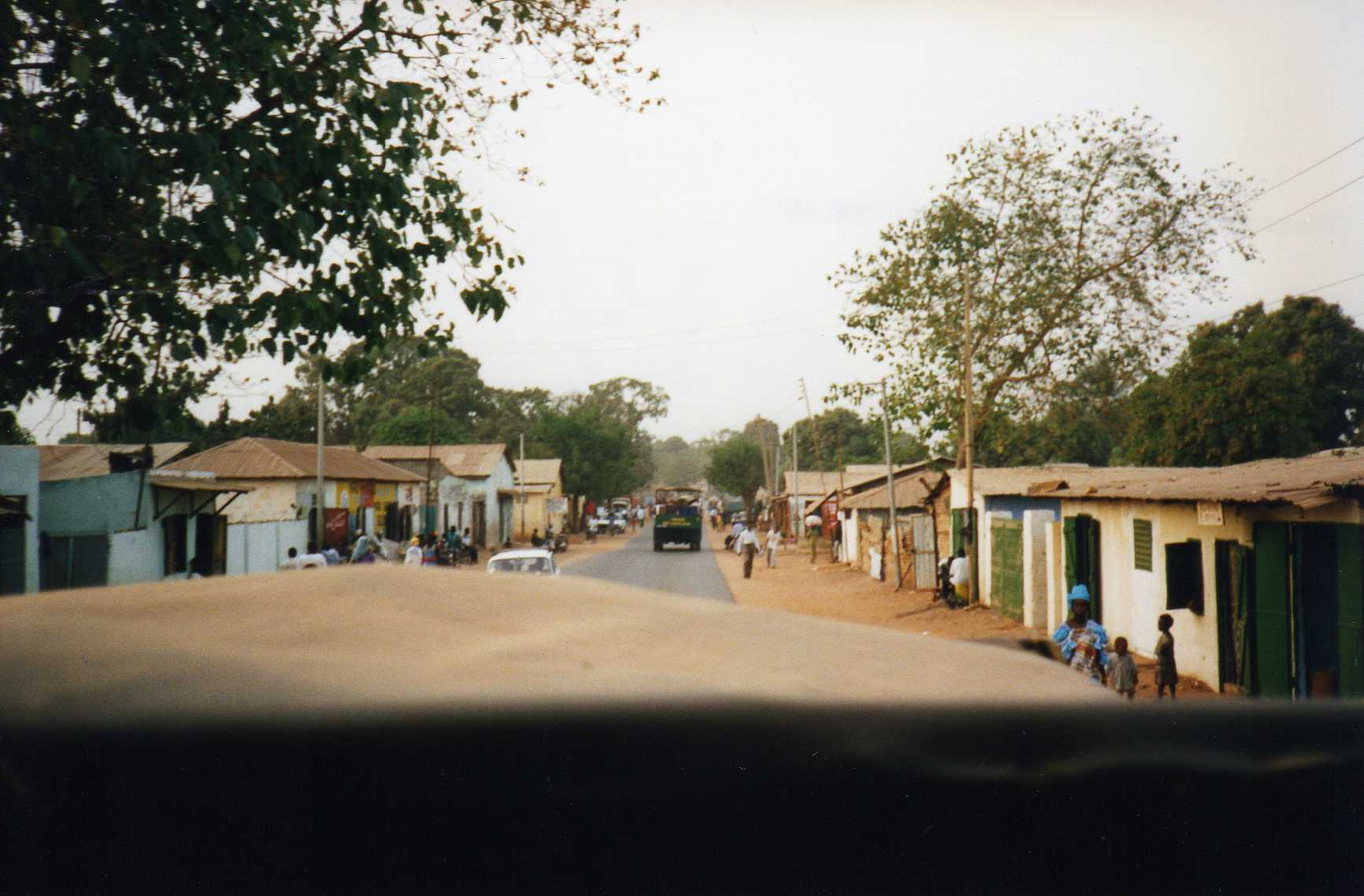 Sukuta